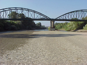 Imagen del rio Guadiaro a su paso por el Puente Hierro